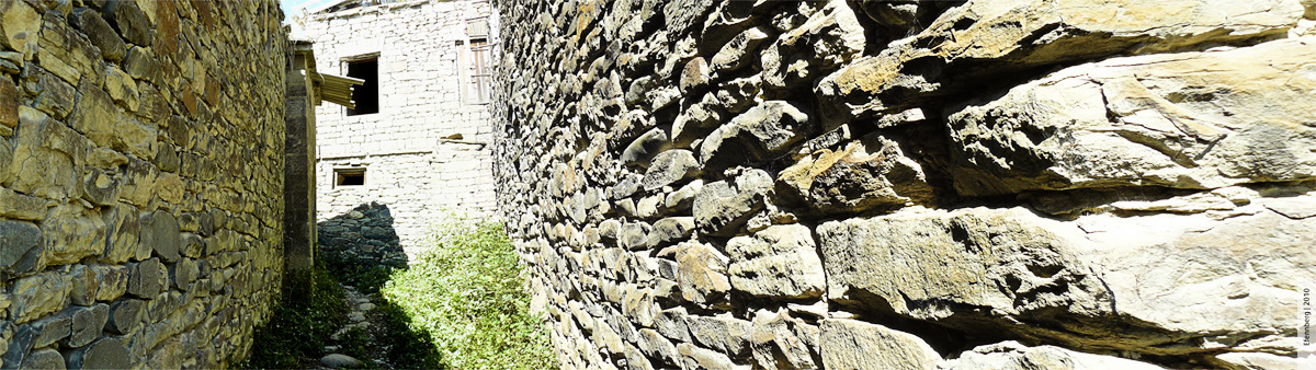 Хури, старая часть